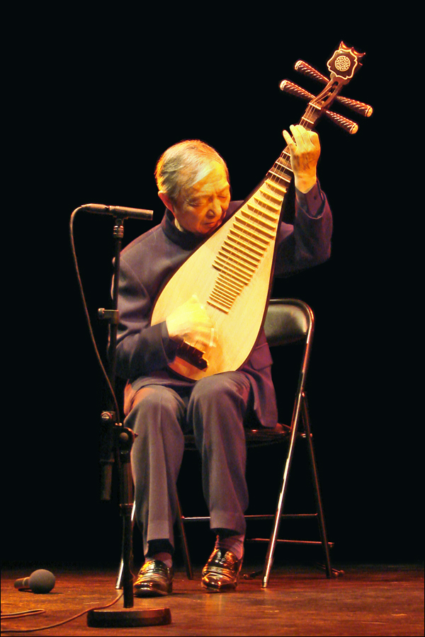 Un concert éblouissant de virtuosité et de créativité instrumentale par deux très grands joueurs de Pipa : Dehai Liu, le maître et Lingling Yu, son élève devenue elle aussi une musicienne d'exception. Vendredi 5 novembre dans l'auditorium du musée Guimet à Paris voir aussi